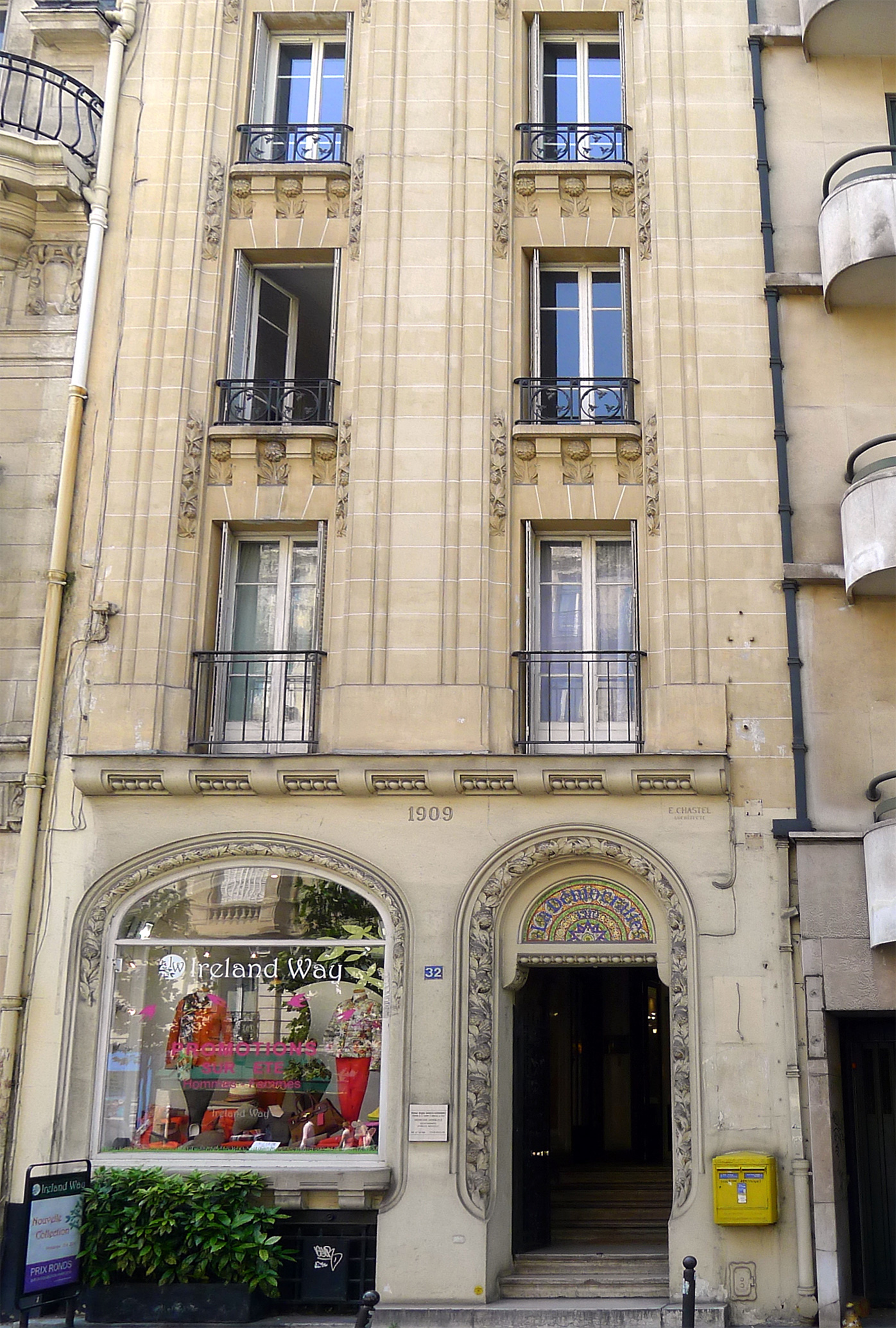 Boulevard Raspail (n° 32) - Paris VII